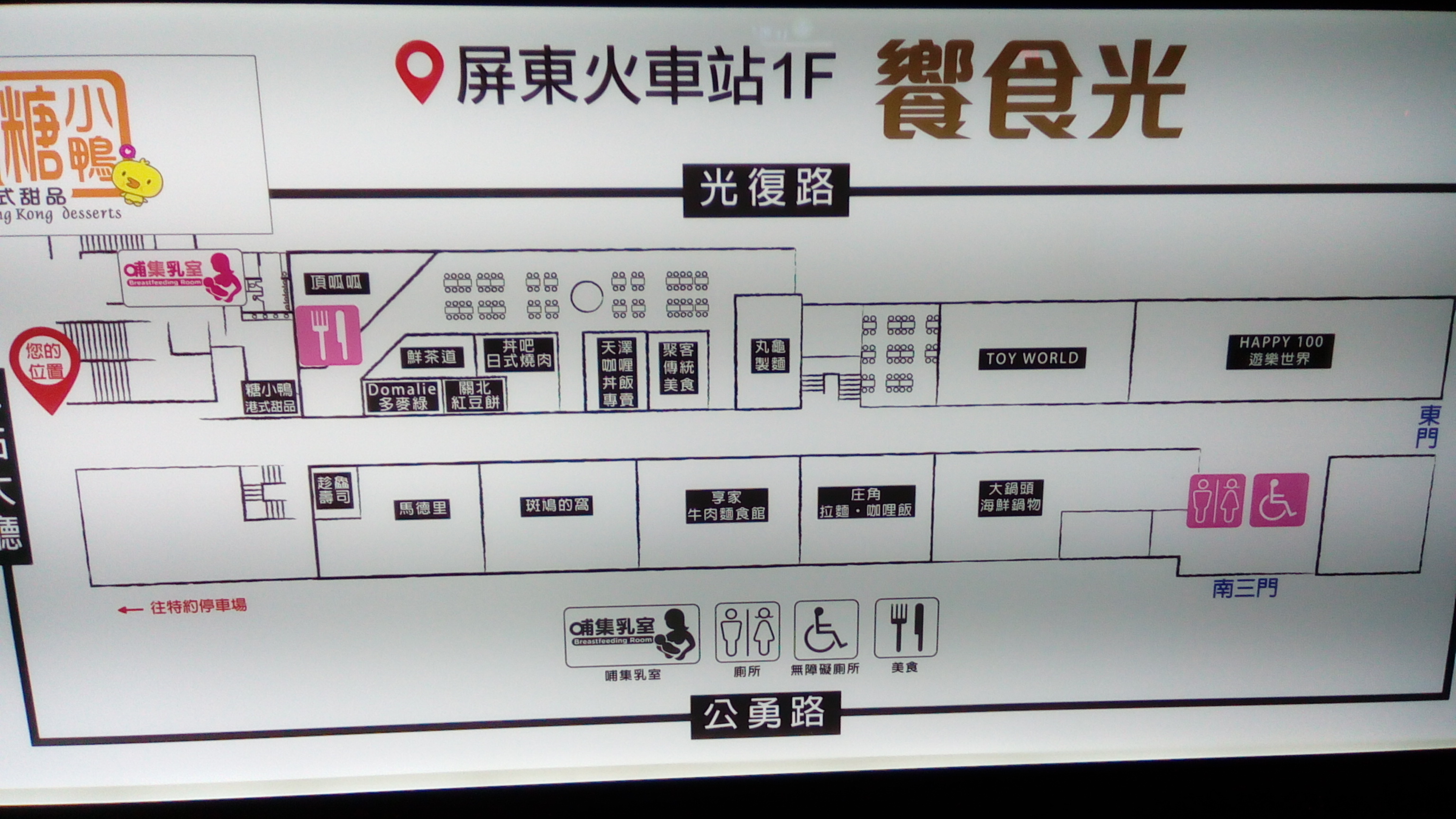 張貼於大廳一樓的車站平面圖